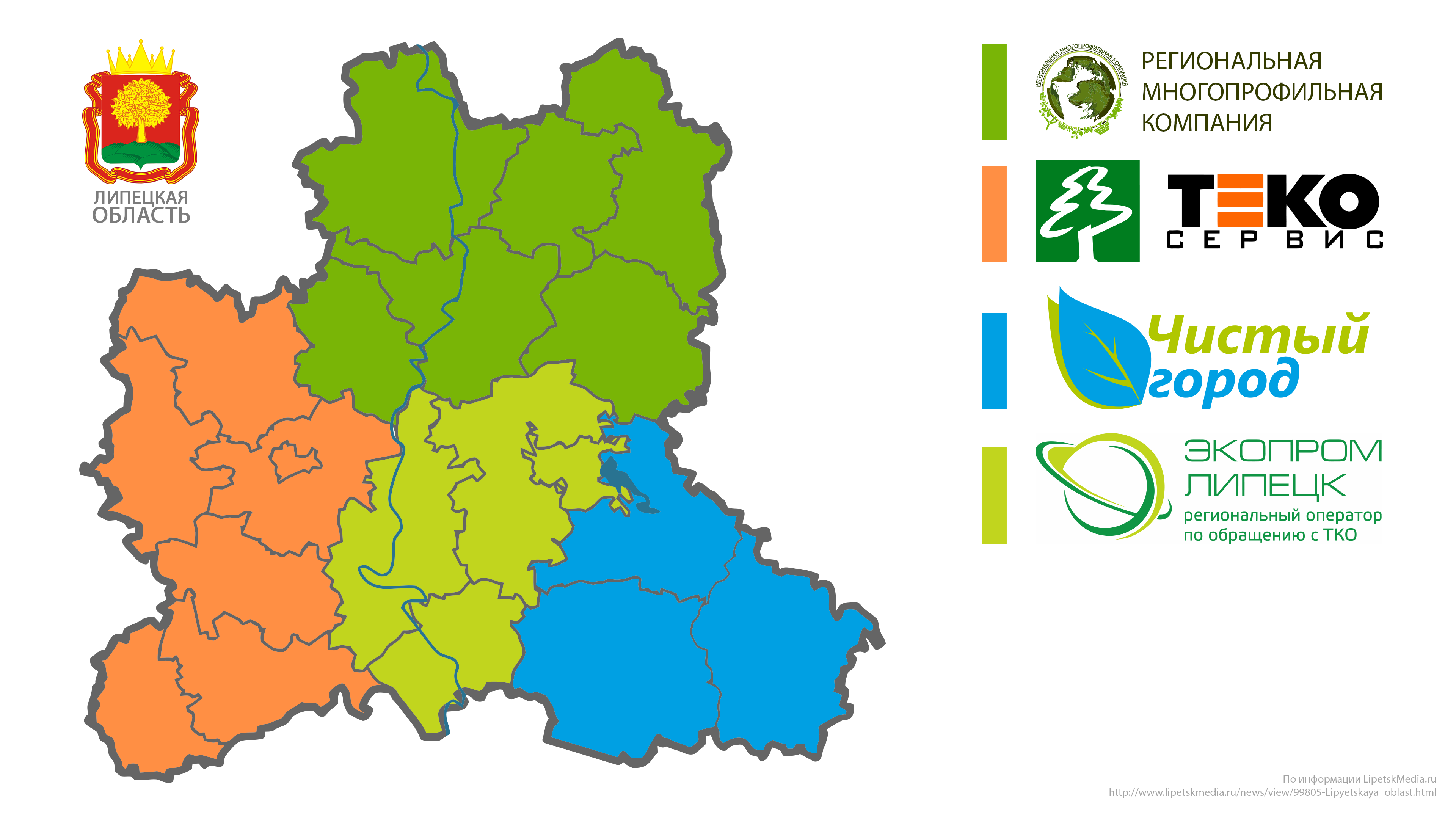 Карта региональных операторов по обращению с твёрдыми коммунальными отходами